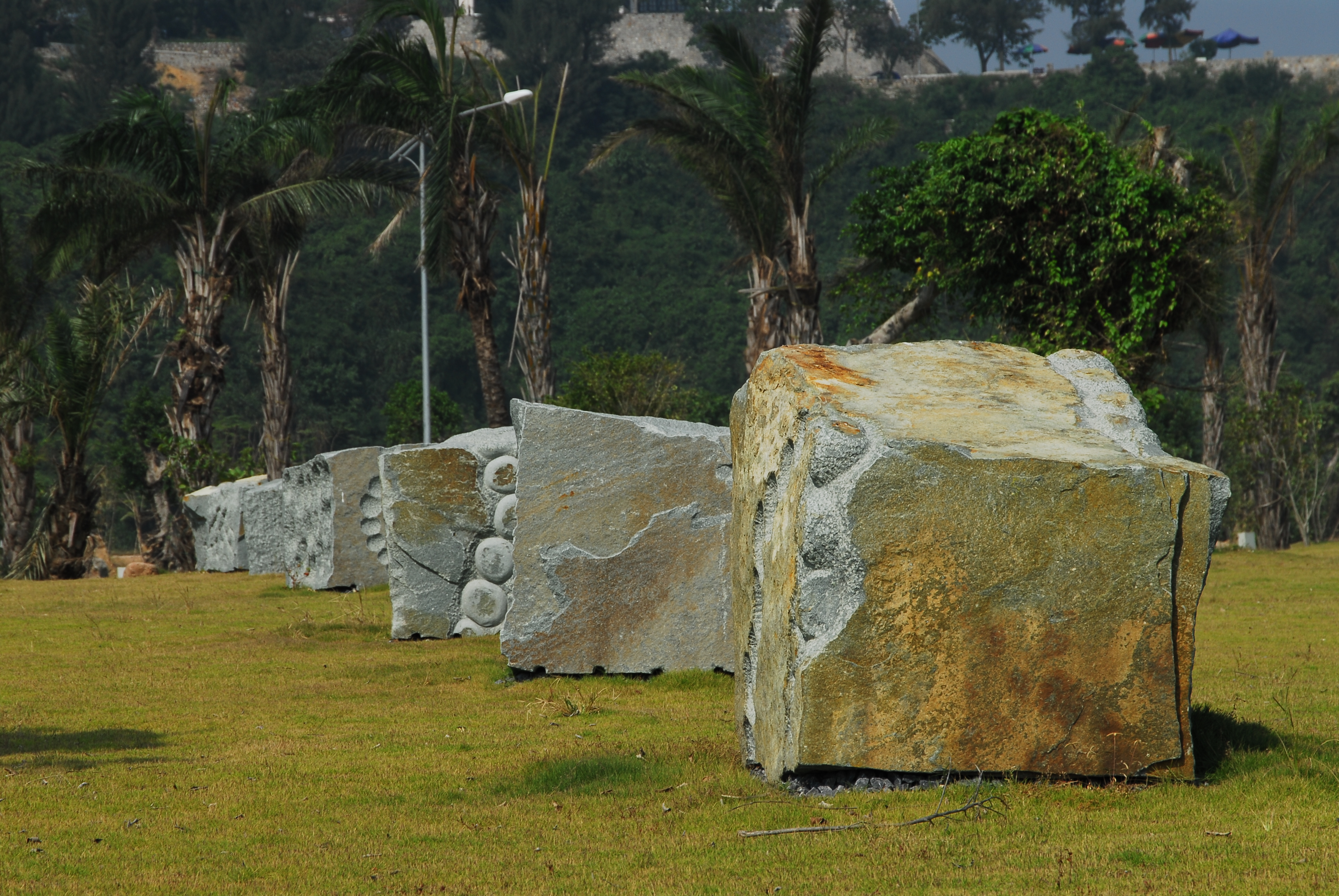 Granitskulpturen von Wilfried Behre in Vietnam Nähe Hanoi 2007 geschaffen in Vietnam